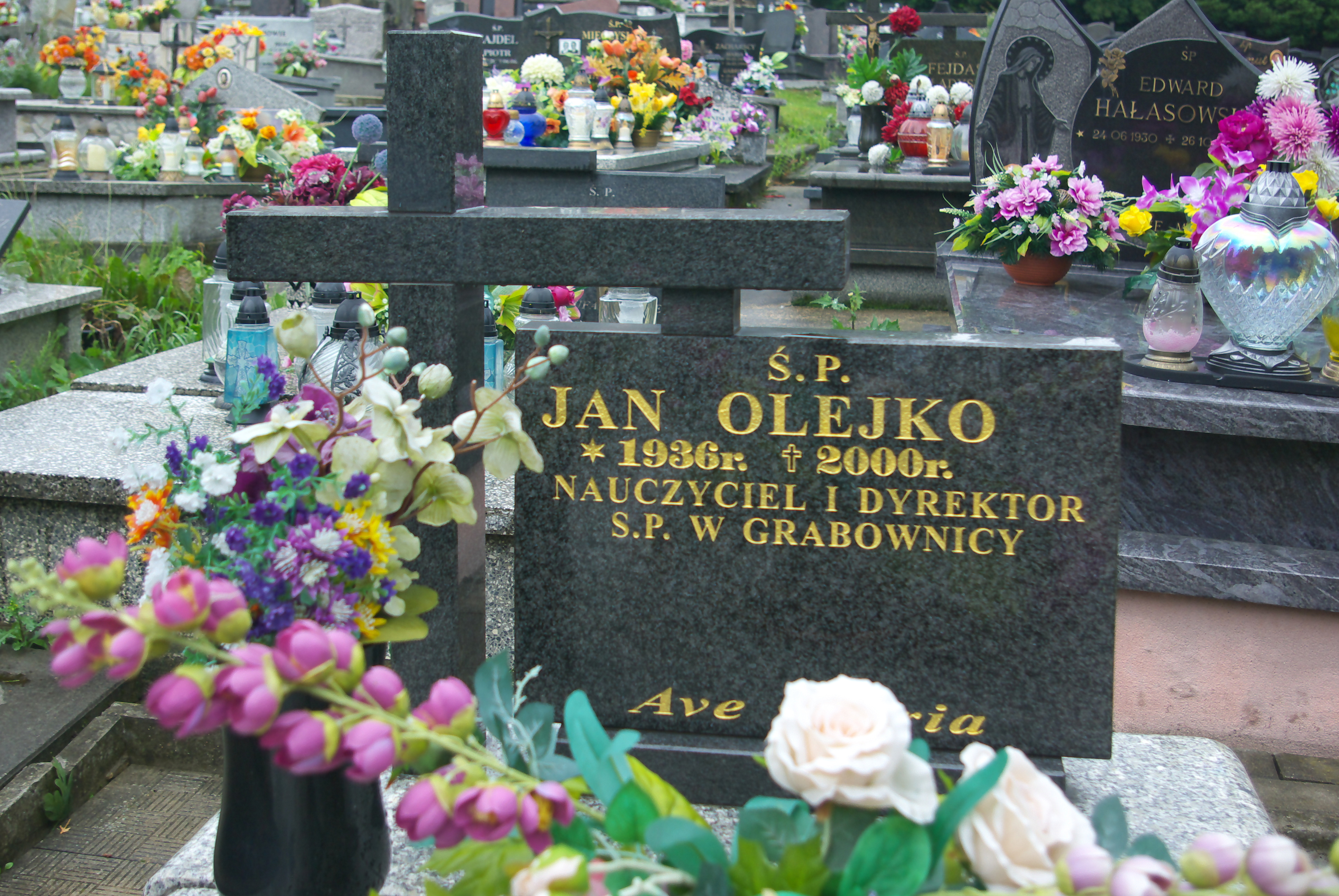 Grób Jana Olejki na cmentarzu w Grabownicy Starzeńskiej.